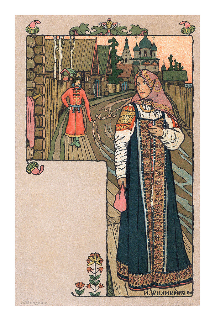 Утро воскресенья. 1901. Открытка издания "Общины св. Евгении". №142. Из коллекции Э.Б. Файнштейна